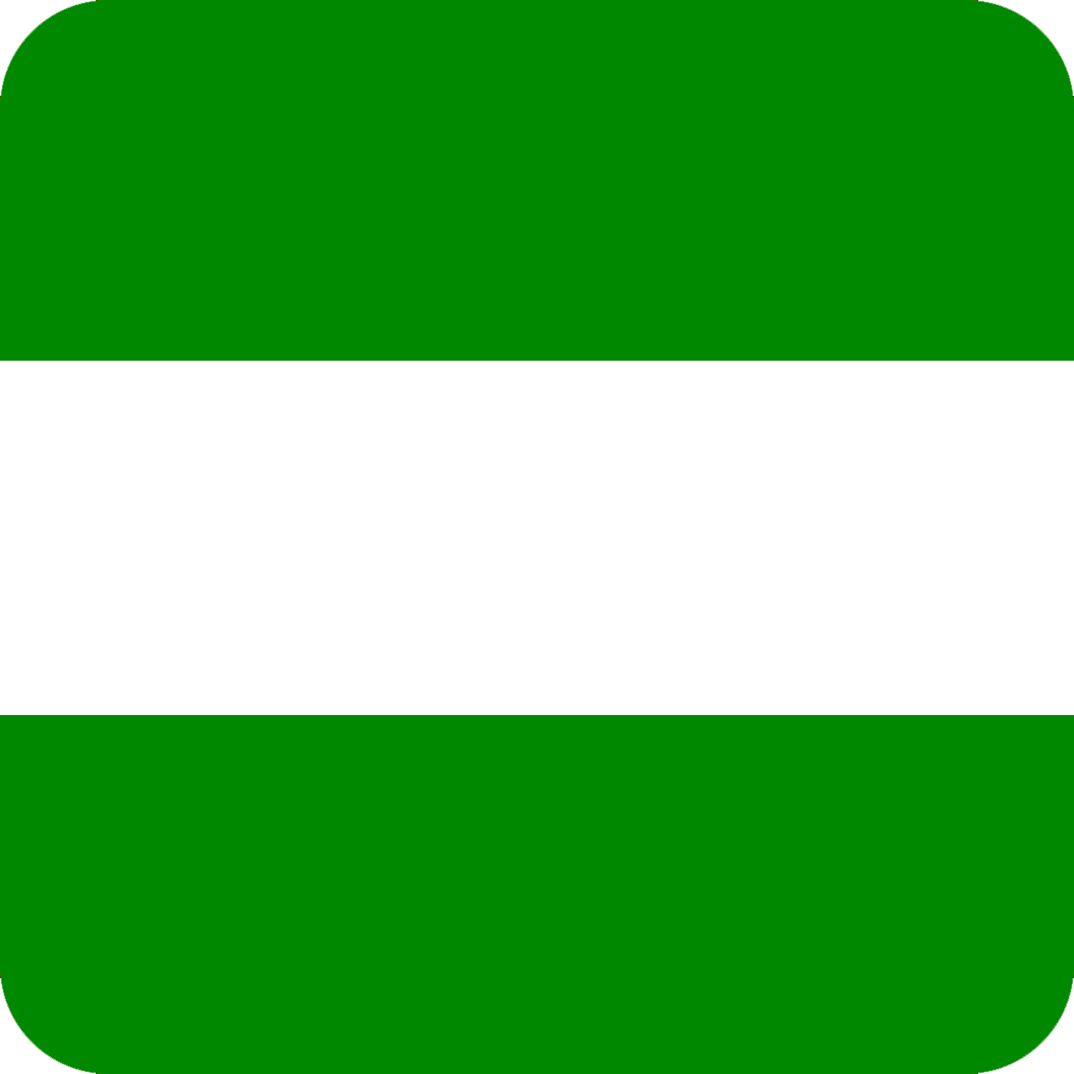 Ícono del Partido Liberación Nacional, Costa Rica.